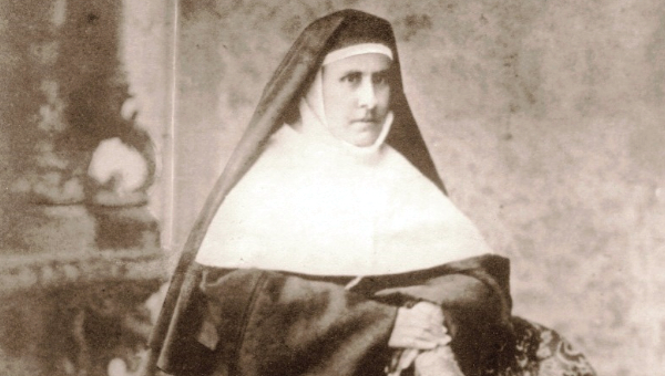 Venerable Madre Camila después de la fundación del Instituto.